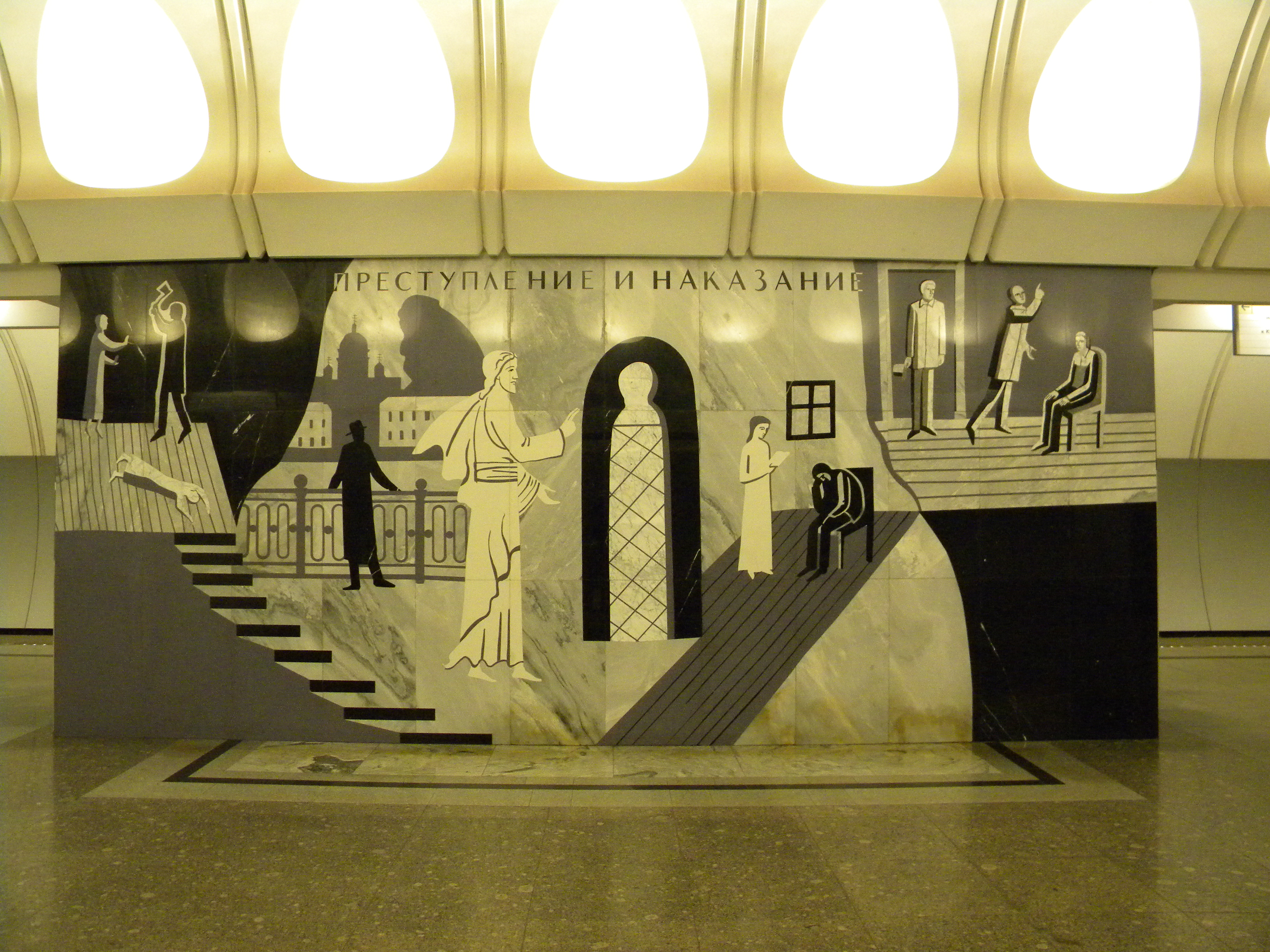 Dostoevskaya